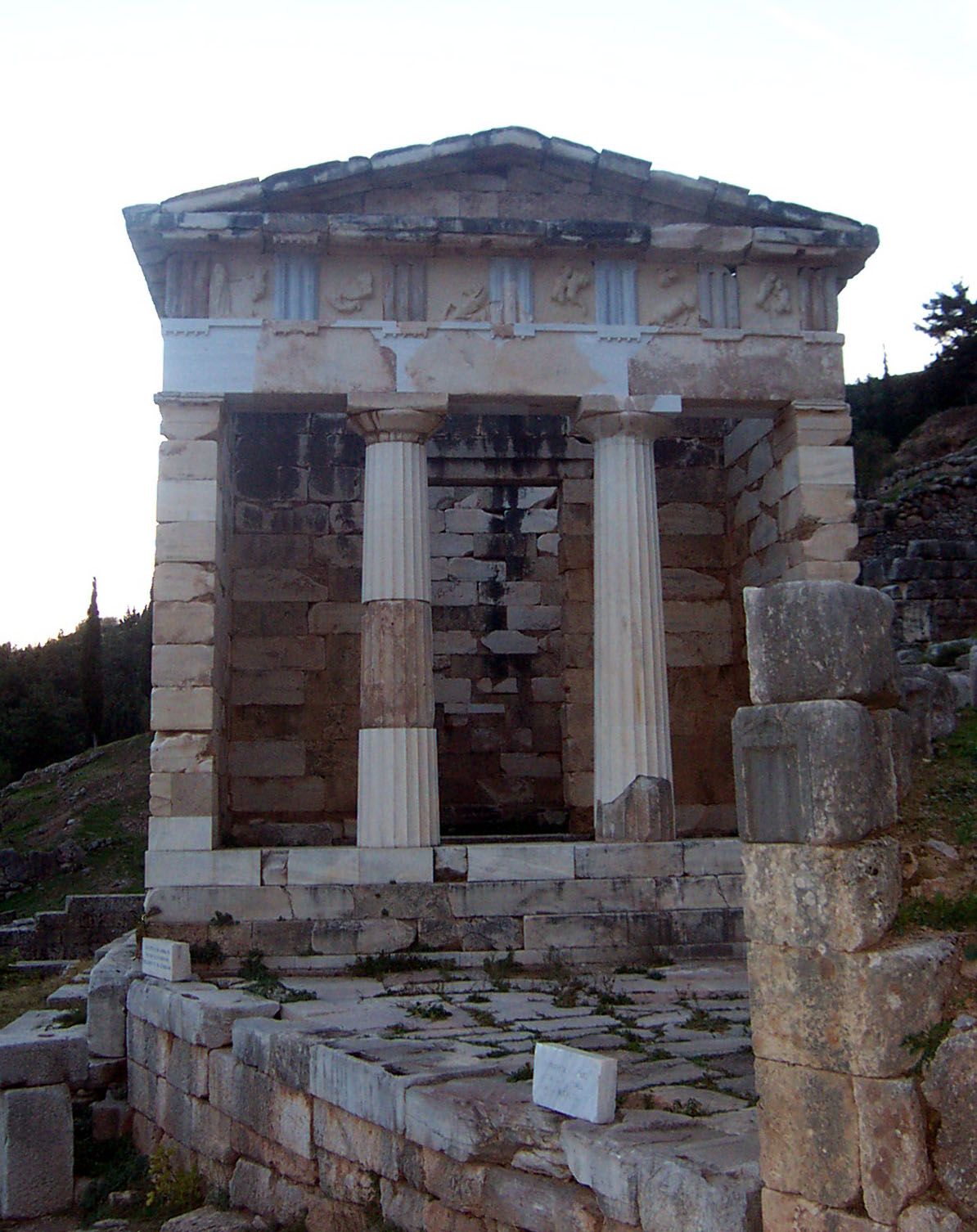 El tesoro de los Atenienses en Delfos